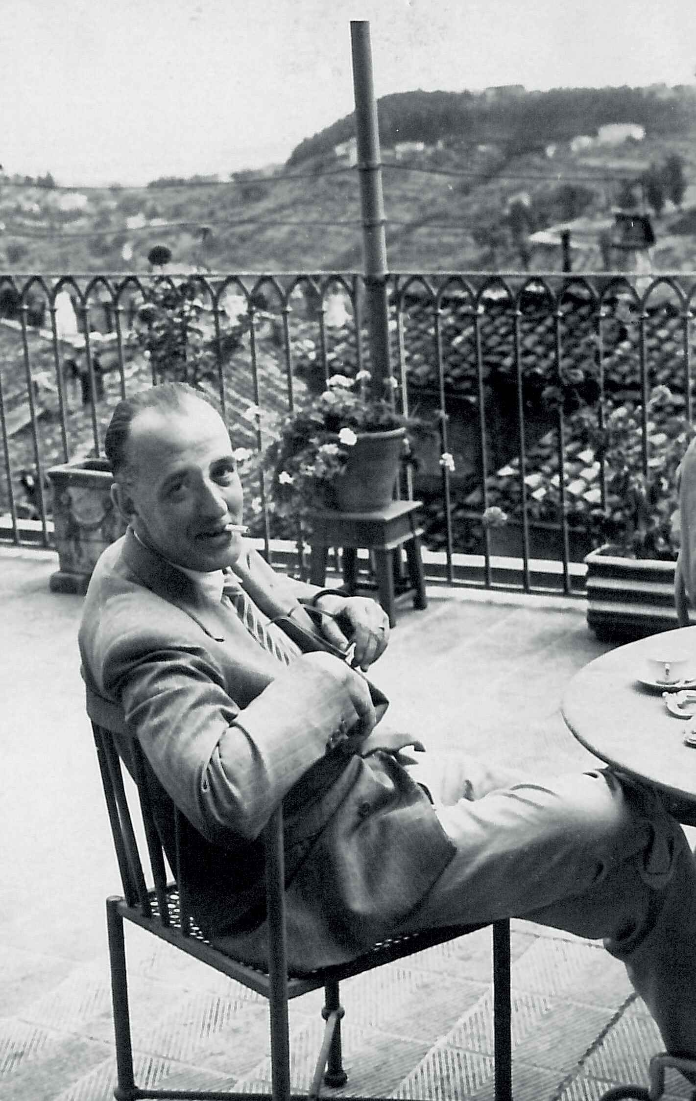 Uguccione Ranieri sulla terrazza di Palazzo Sorbello a Perugia, 1960 ca.